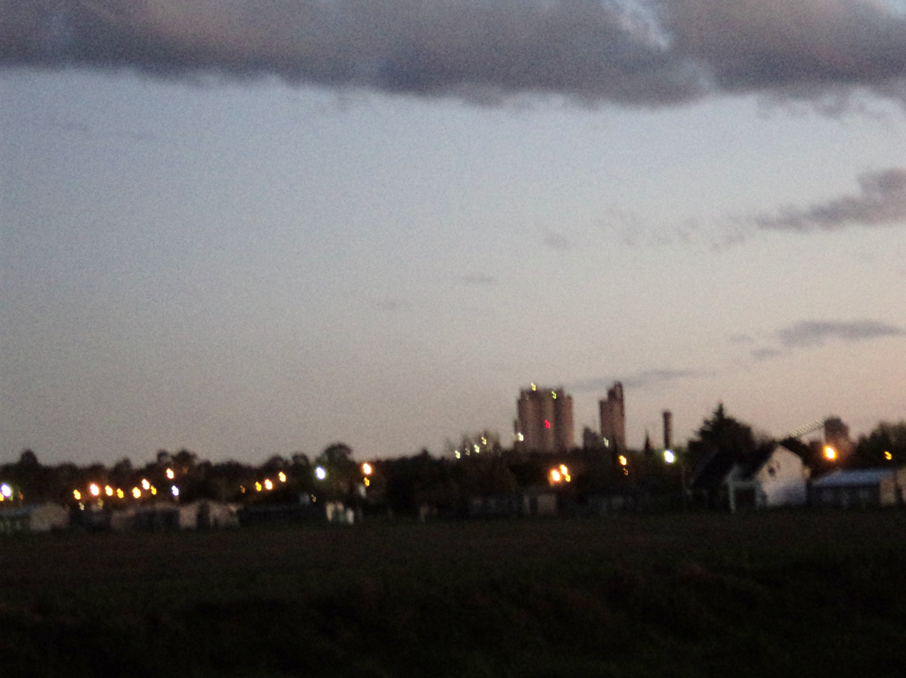 vista panoramica de loma negra